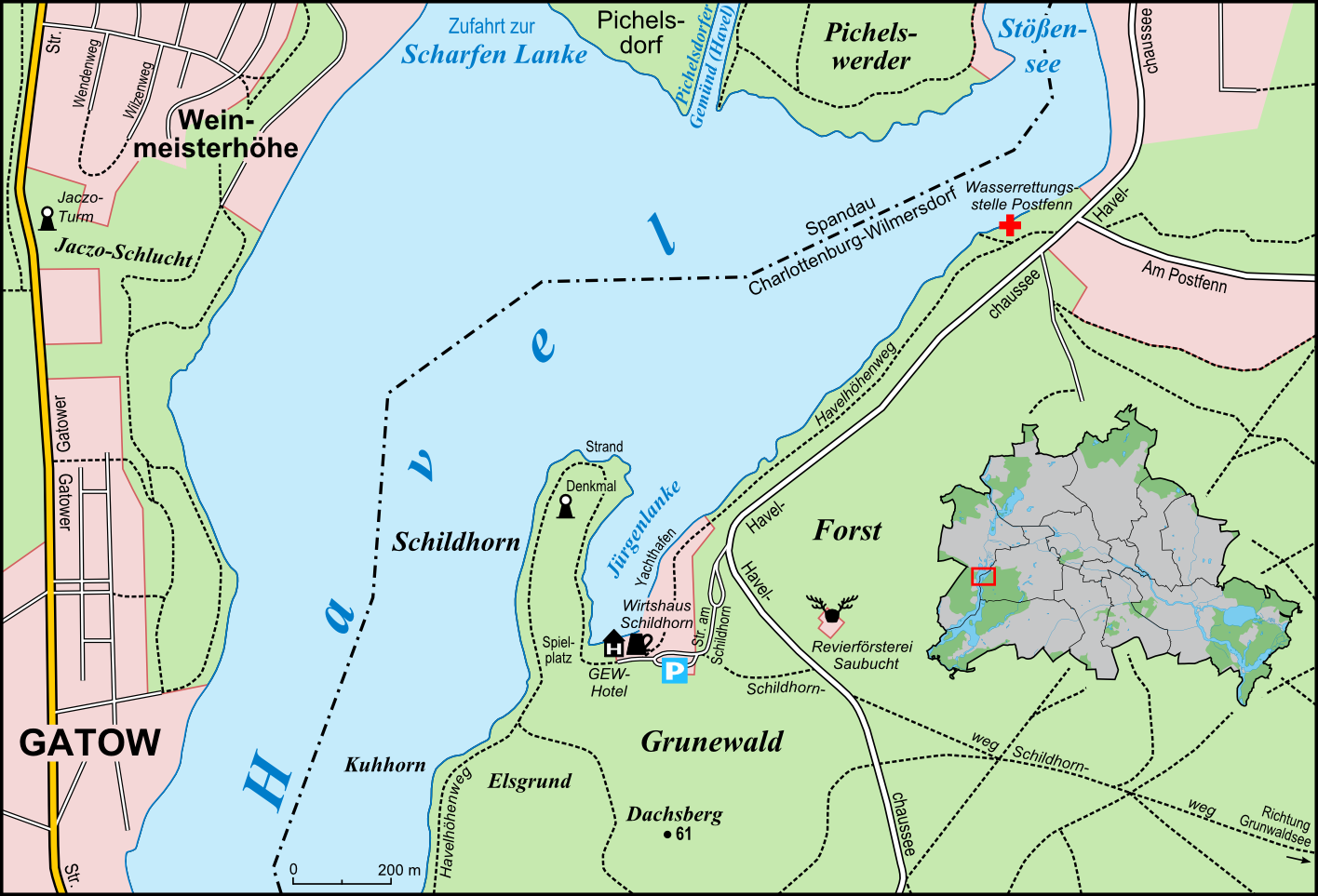 Karte der Halbinsel Schildhorn in Berlin und seiner Umgebung